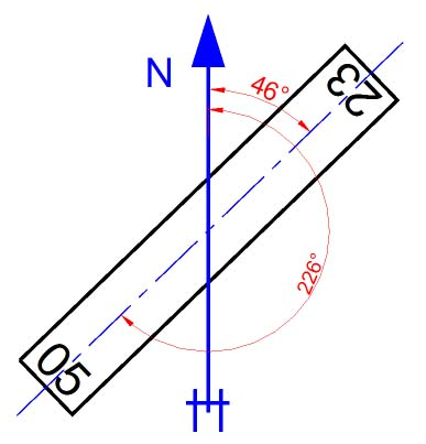 Exemple de détermination des QFU d'une piste